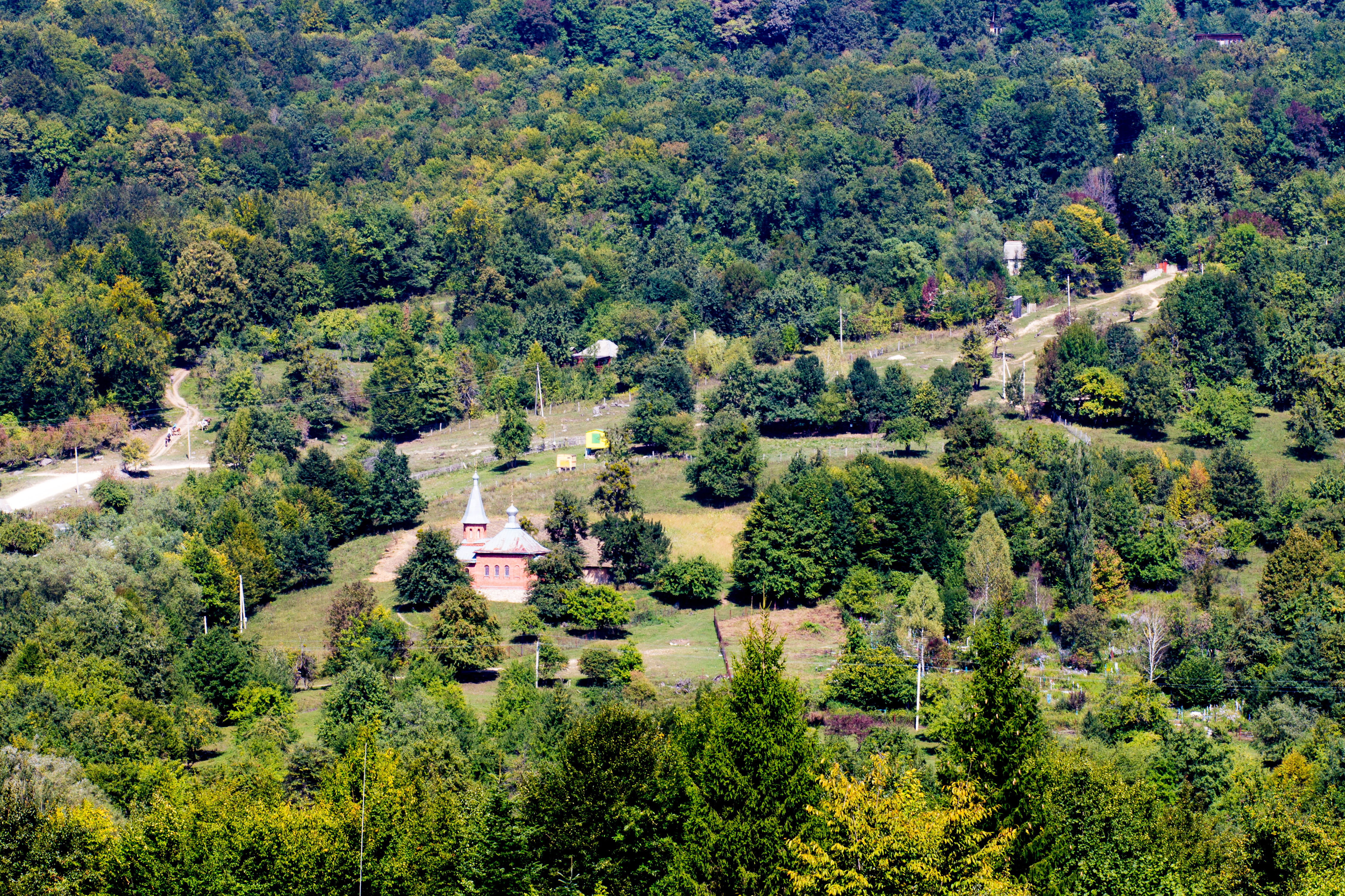 Mezmai